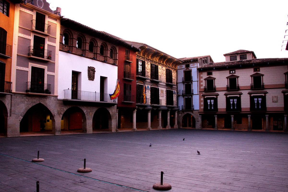 Vista general de la plaça Major de Graus (Osca-Espanya)